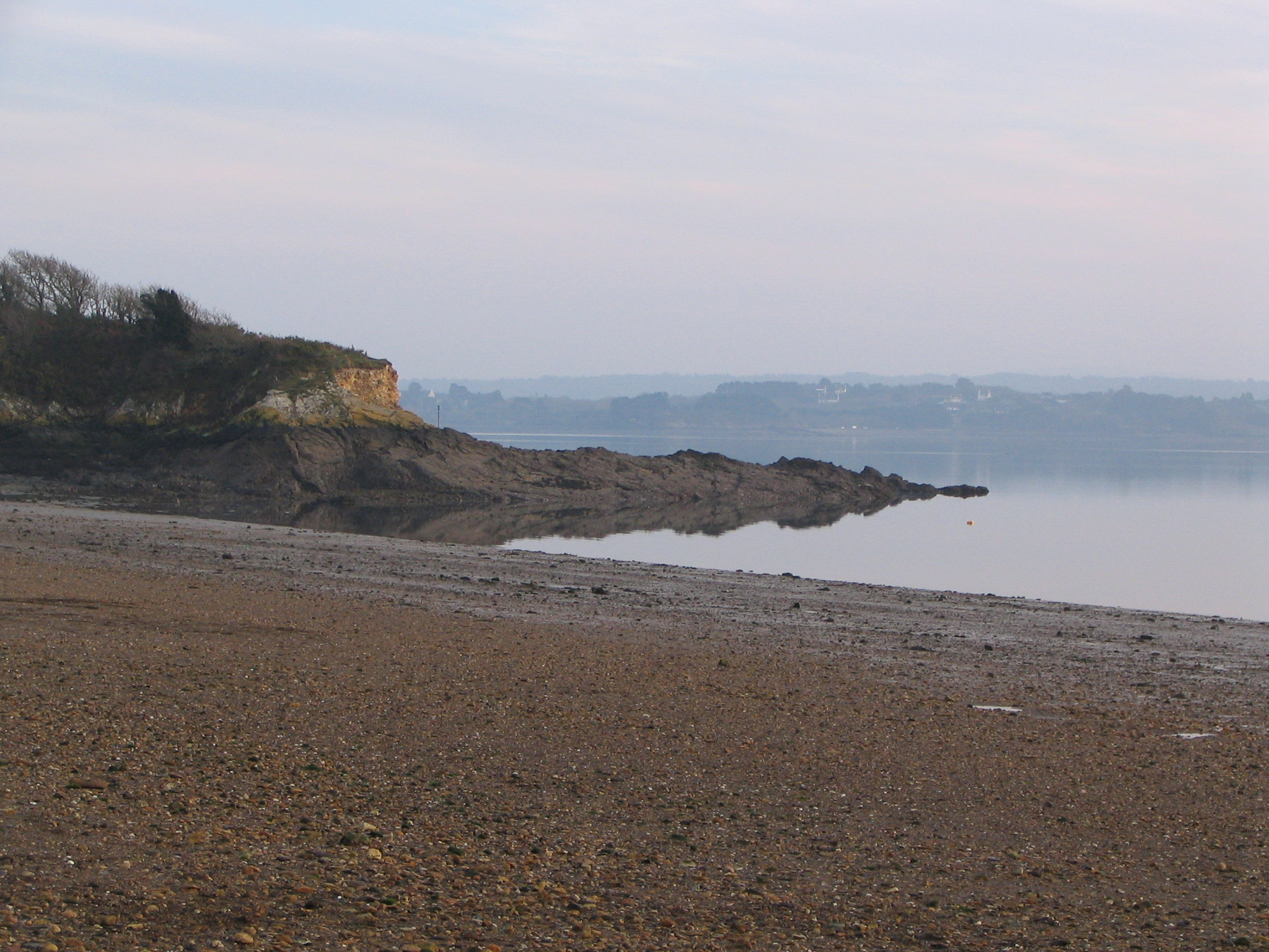 Une plage de Plougastel-Daoulas, arrière-plan Loperhet (Rostiviec).